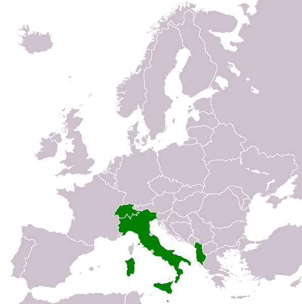 La mappa mostra in quali nazioni europee è presente CRAI le quali sono colorate di verde.